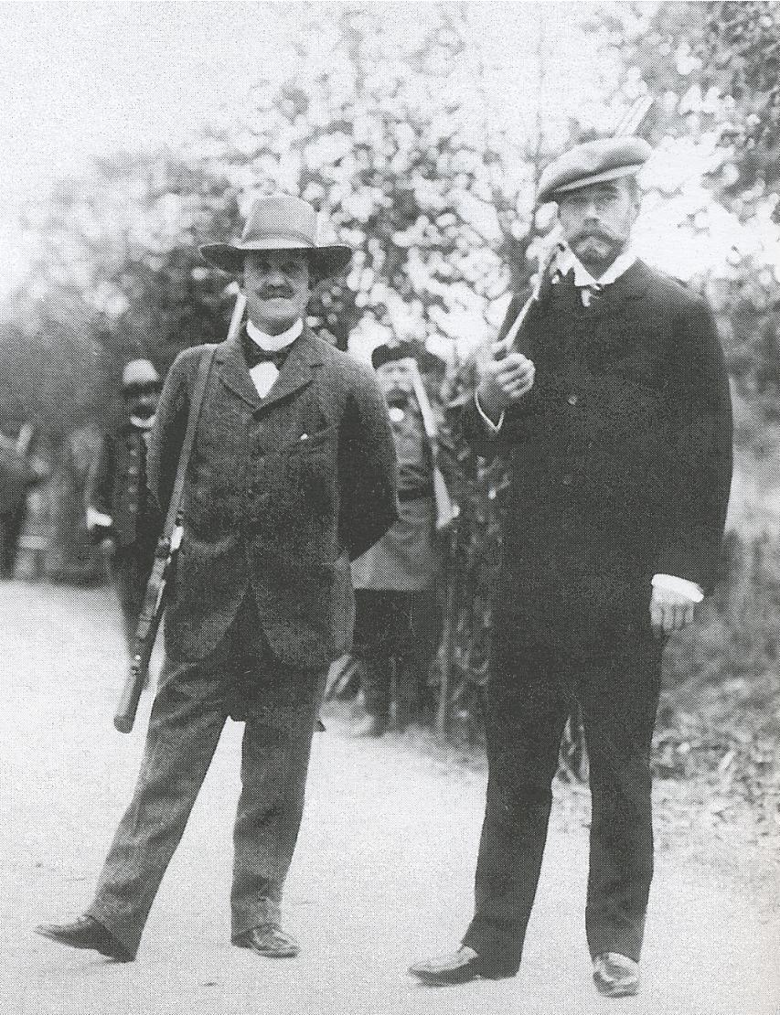 Николай II и Виктор Эммануил III